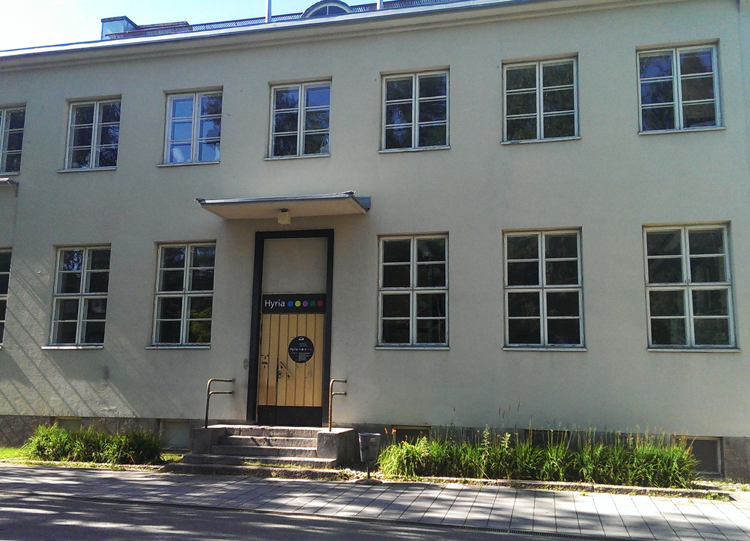 Hyvinkään taidekoulu